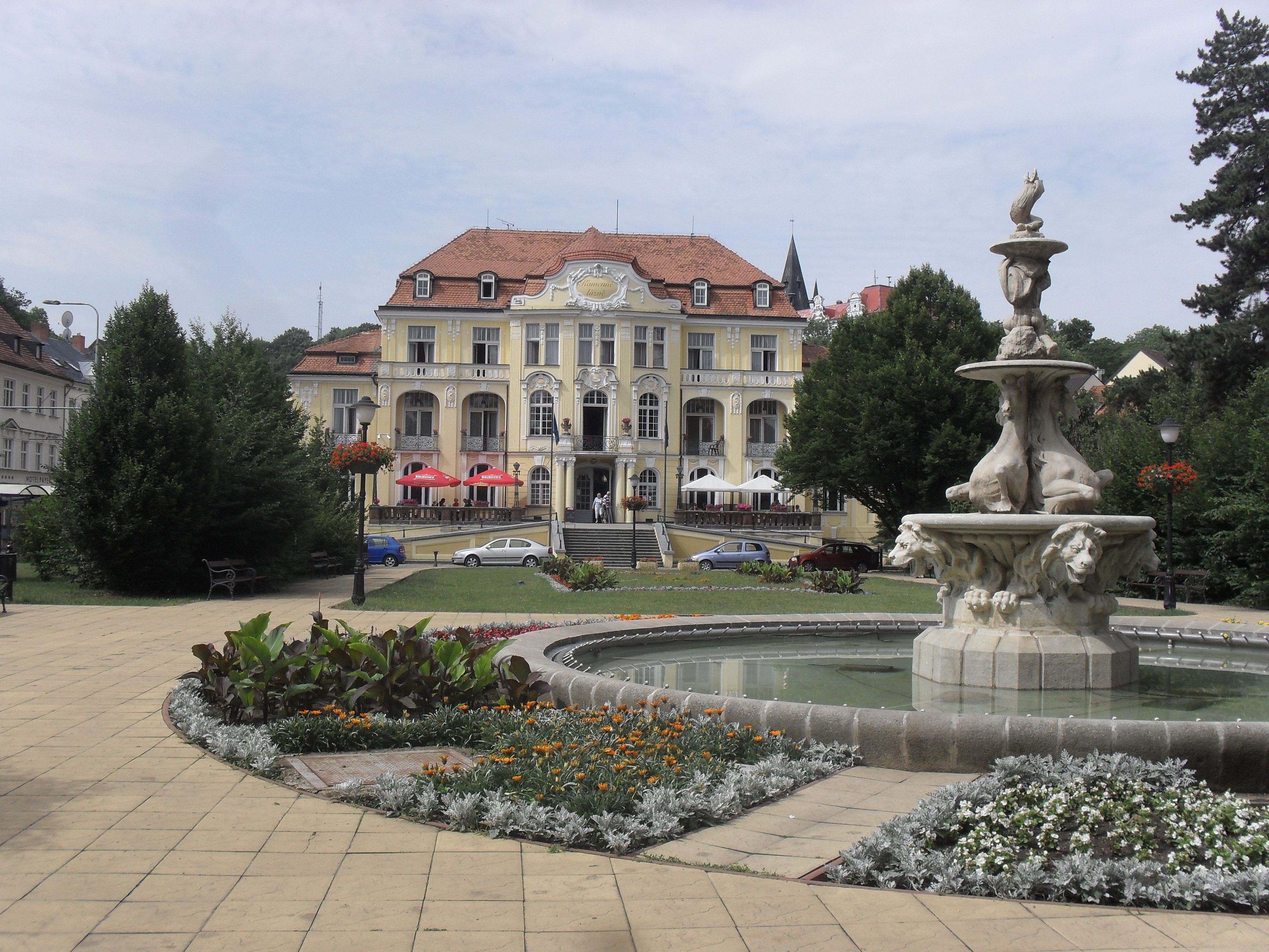 Kamenné lázně